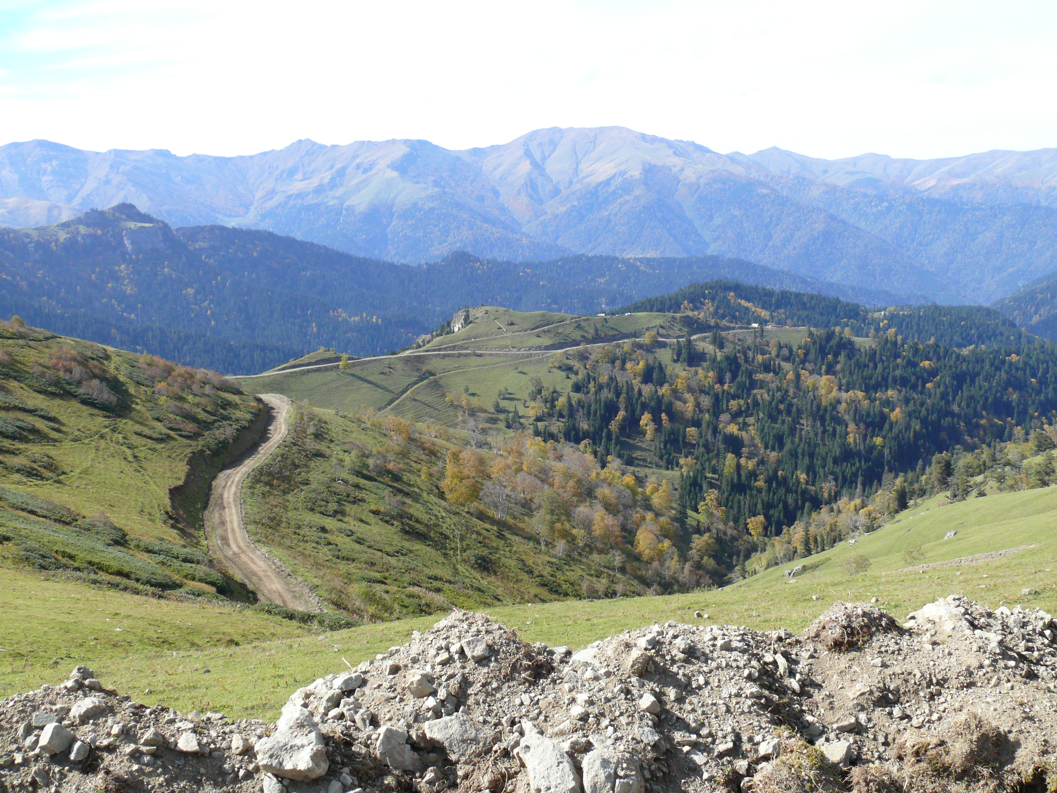 Horská silnice ze Zekarského průsmyku do Sairme přes sedlo 2283 m